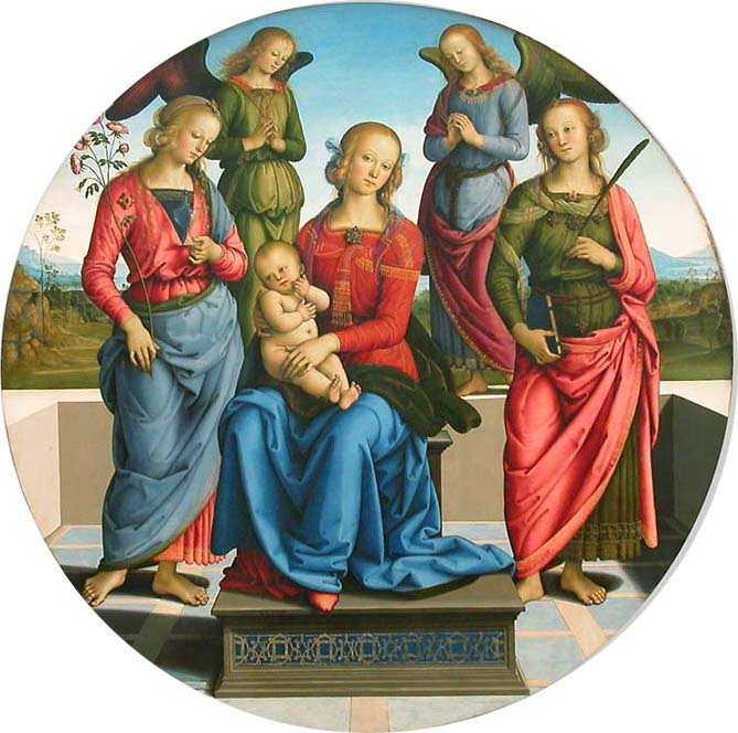 Perugino, Tondo della Vergine col Bambino tra due sante e due angeli.jpg